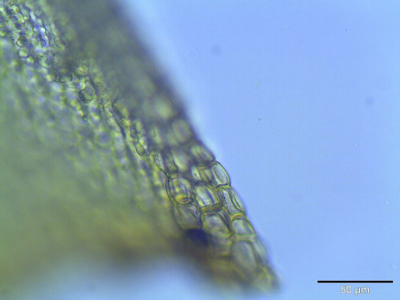 Verlängerte Zackenmütze (Racomitrium elongatum), Blattflügelzellen, Vergrößerung: 400x